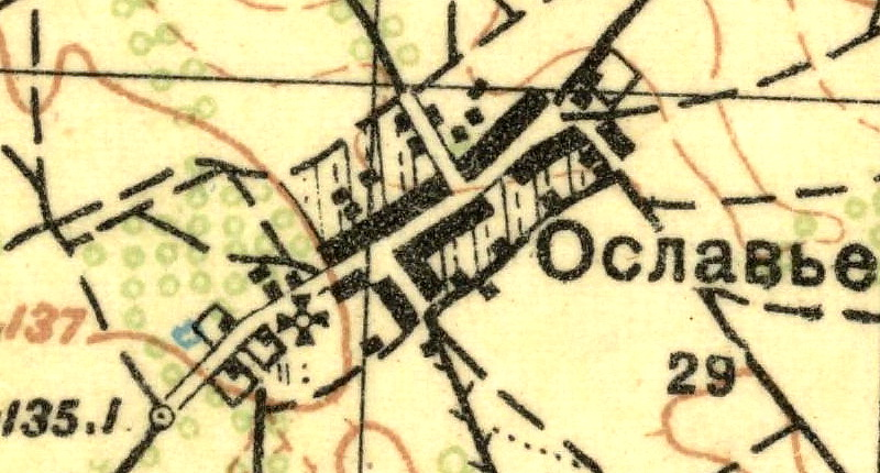 Топографическая карта Ленинградской области, квадрат О-35-23-Г (Волосово), деревня Ославье